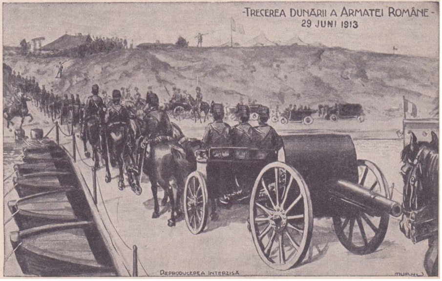 1913 - Trecerea Dunării 29 iunie, în cel de-al doilea război balcanic - reproducere după o ilustrată din epocă